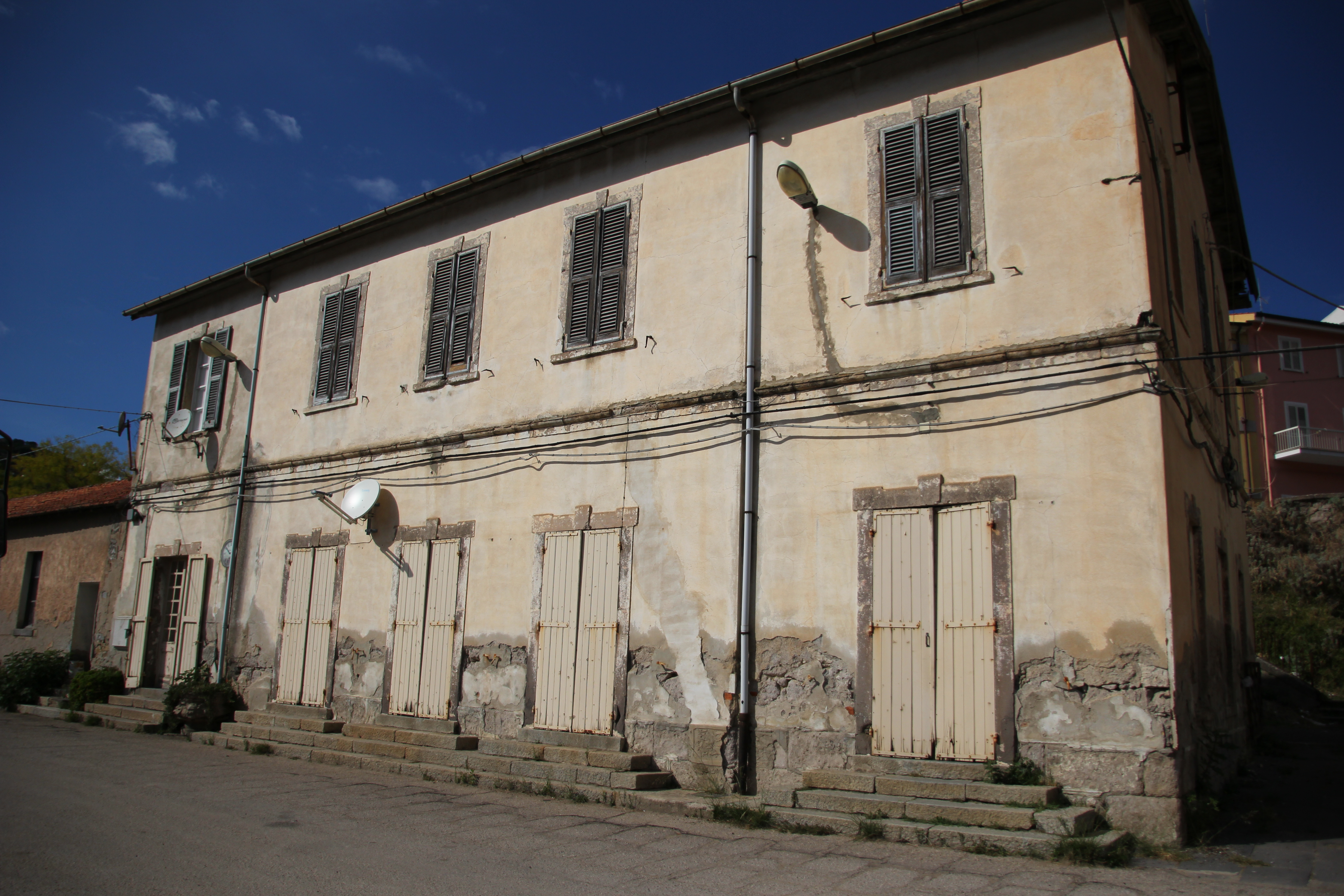 Ozieri - La vecchia stazione ferroviaria